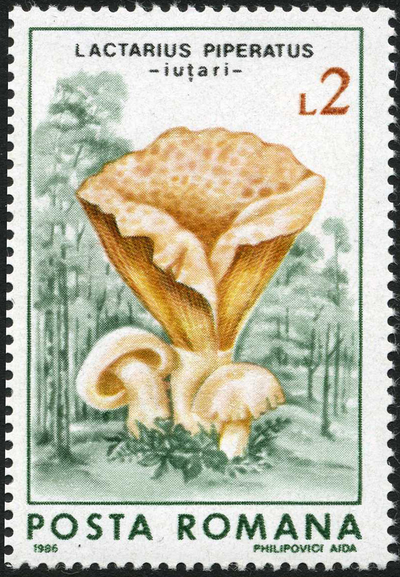 Lactarius piperatus (L.) Pers. on Romanian stamp (1986, 2 lei, Michel №4290)